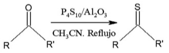 Tionação de Estruturas por P4S10/Al2O3